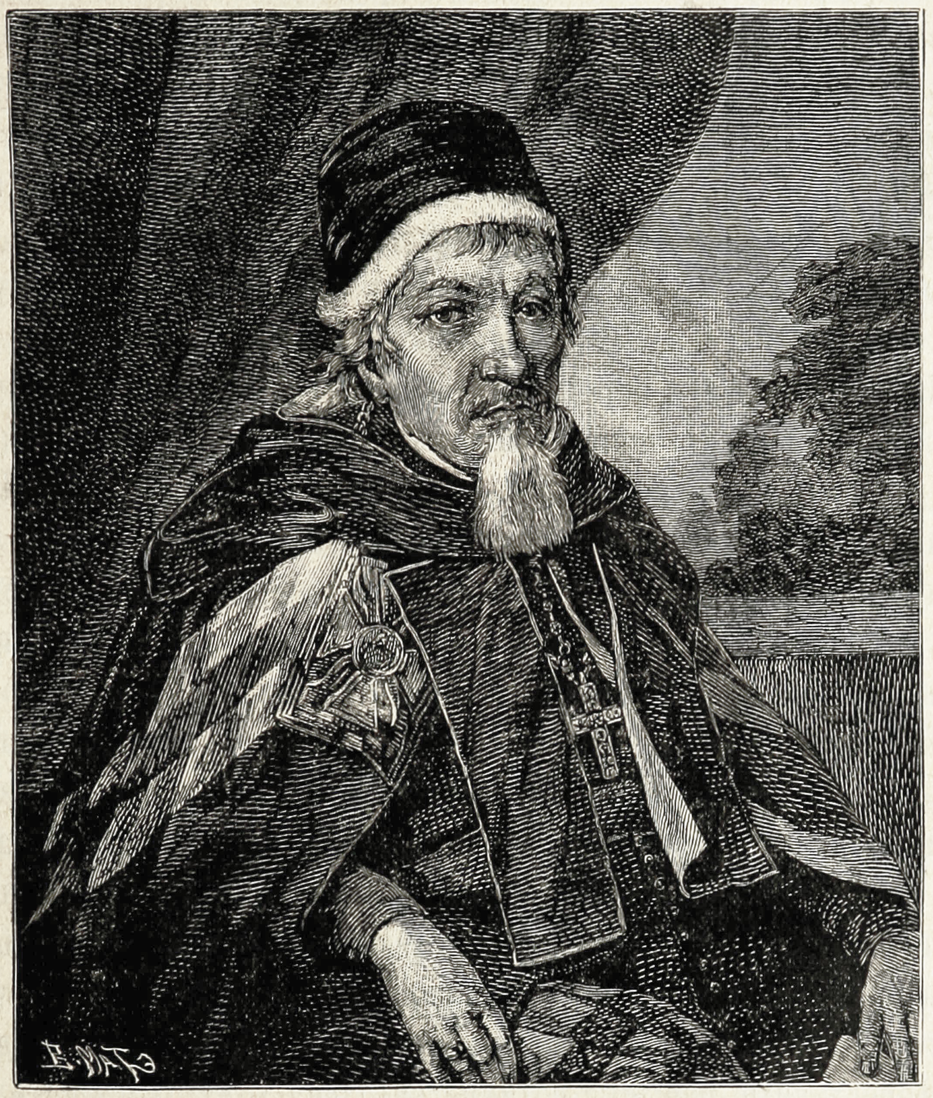 Беларуская (тарашкевіца): Партрэт Флярыяна Грабніцкага (Flaryjan Hrabnicki)